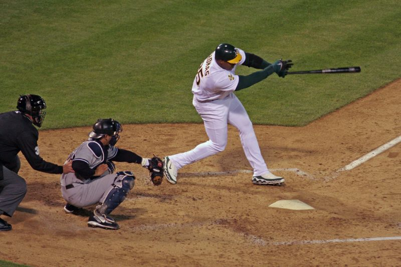 Frank Thomas mid swing. A's vs Yankees.